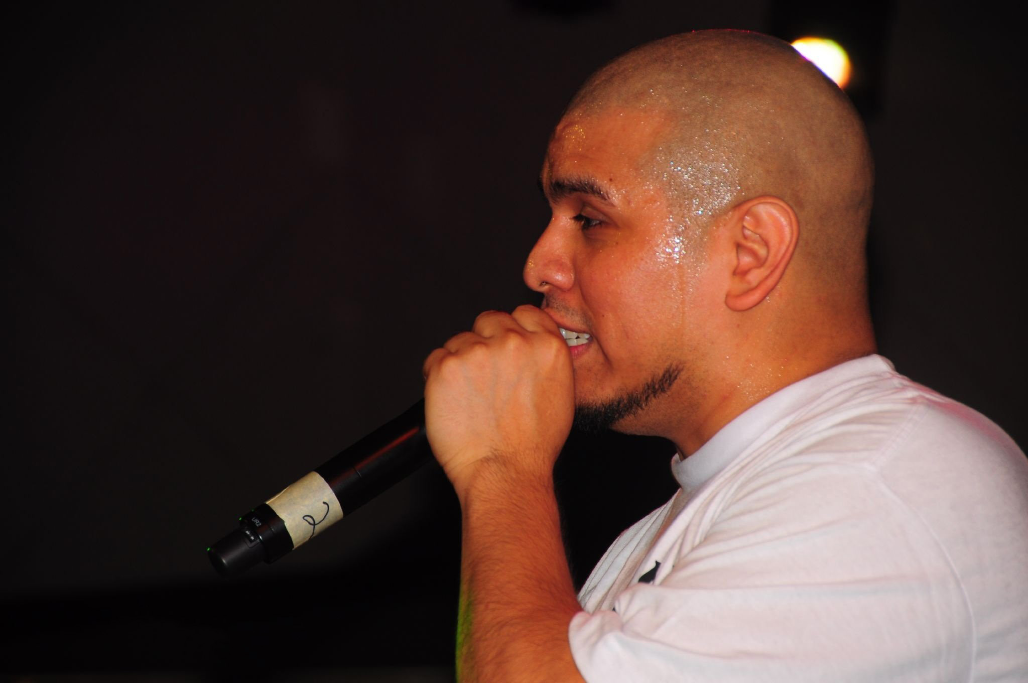 Immortal Technique